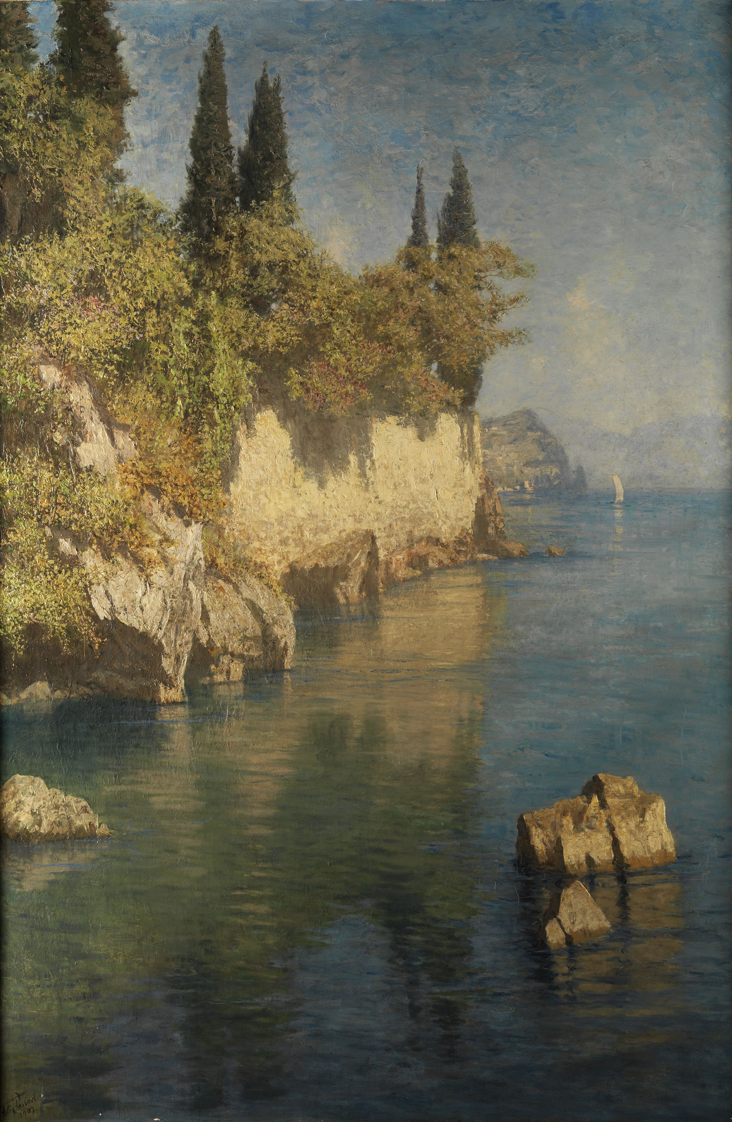 Blick auf das Felsenufer des Comer Sees. Öl auf Leinwand. 150 x 100 cm. Links unten signiert und datiert "1907".